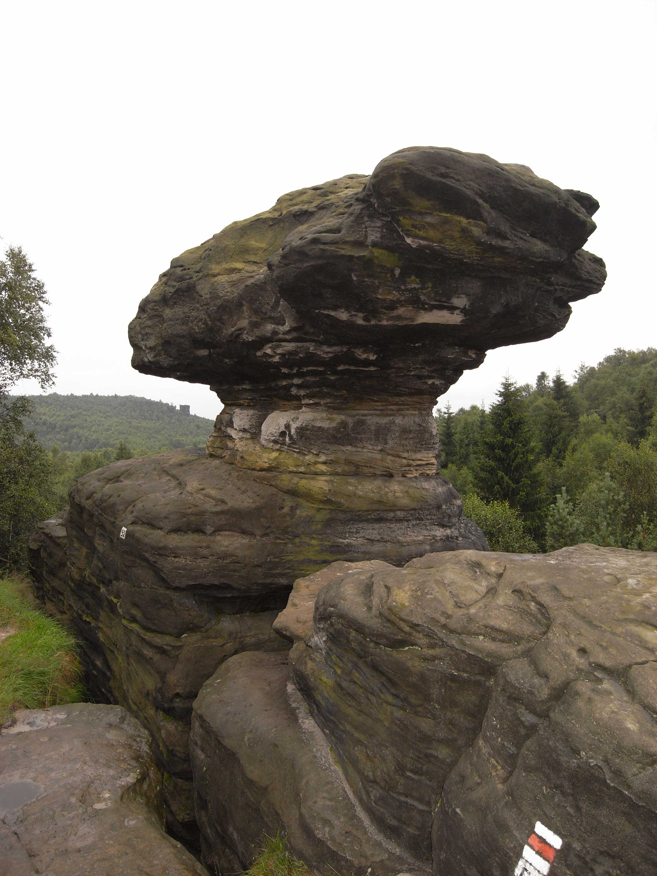 Tyssaer Wände, der Steinpilz (Böhmische Schweiz, Tschechische Republik)